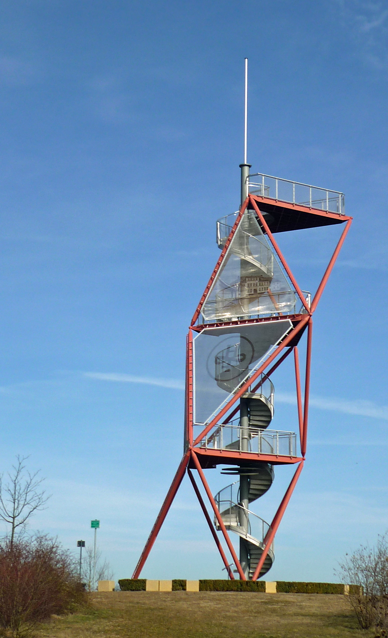 Aussicjtsturm Neu-Haidemühl bei Spremberg/NL